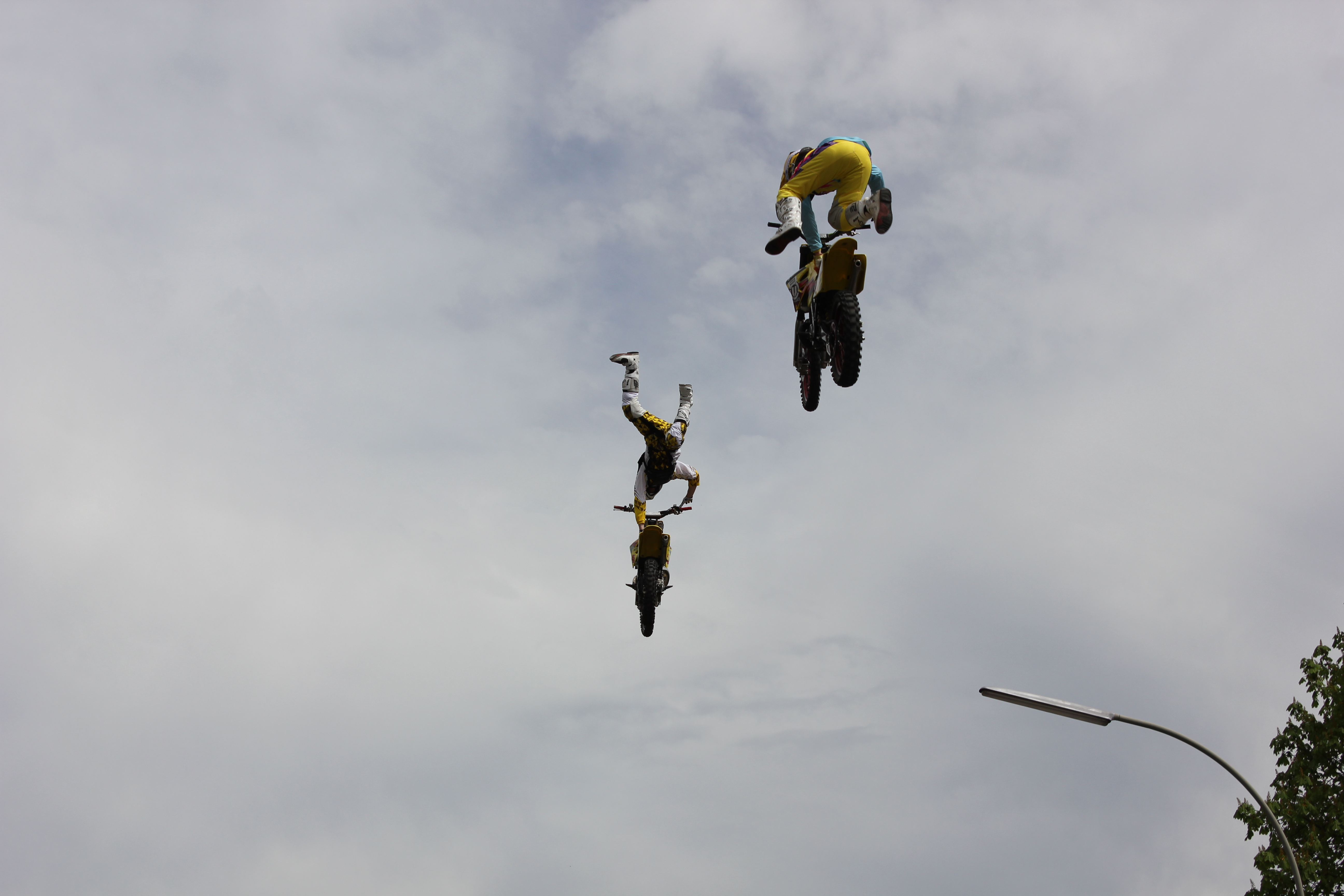 Waghalsige Freestyler zeigen Fahrzeugbeherrschung in Perfektion